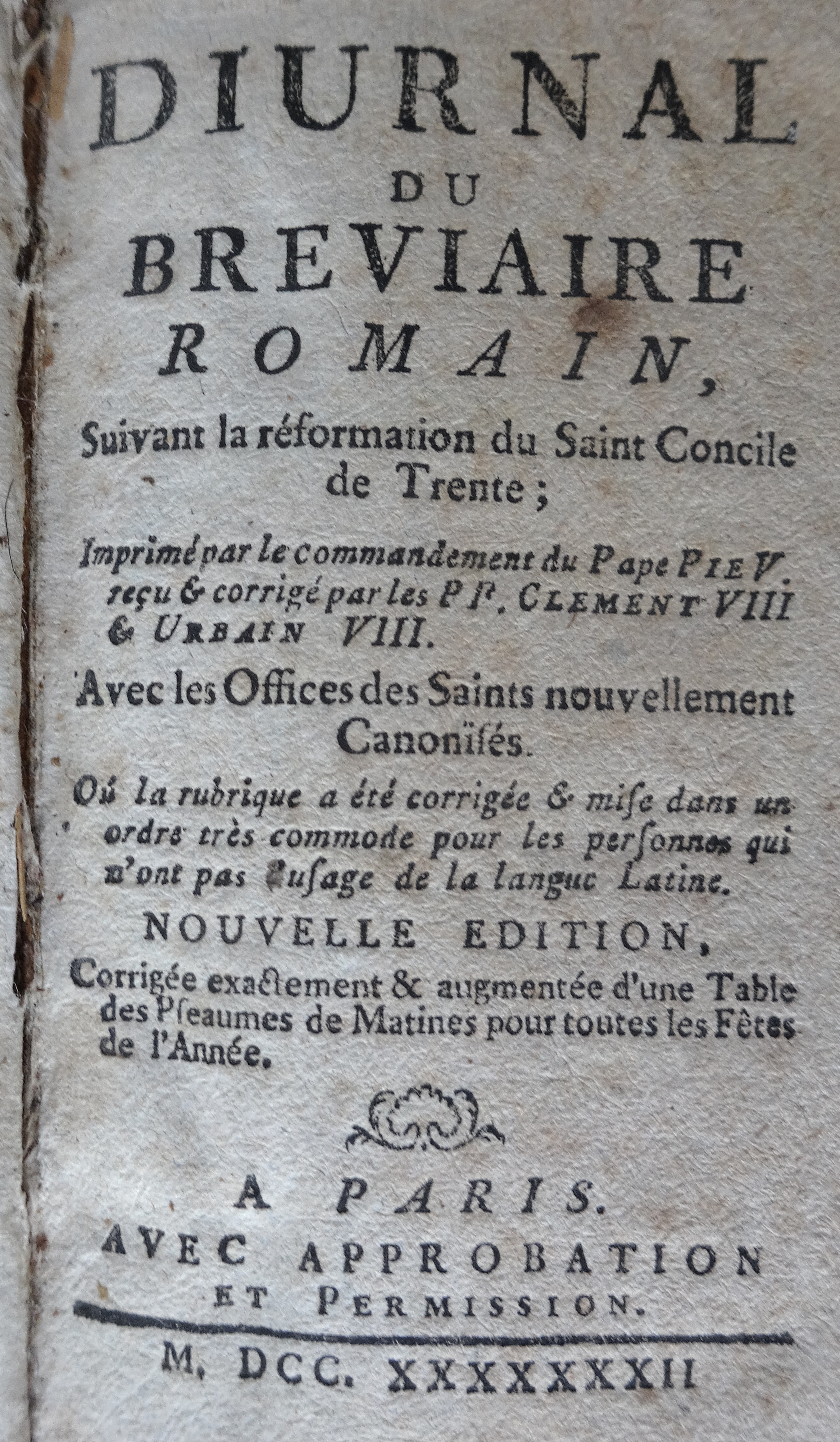 Diurnal du bréviaire romain, Paris, 1772